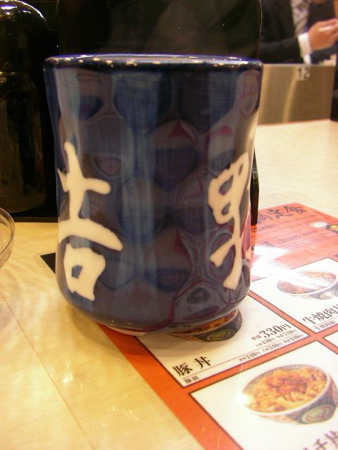 湯呑み.